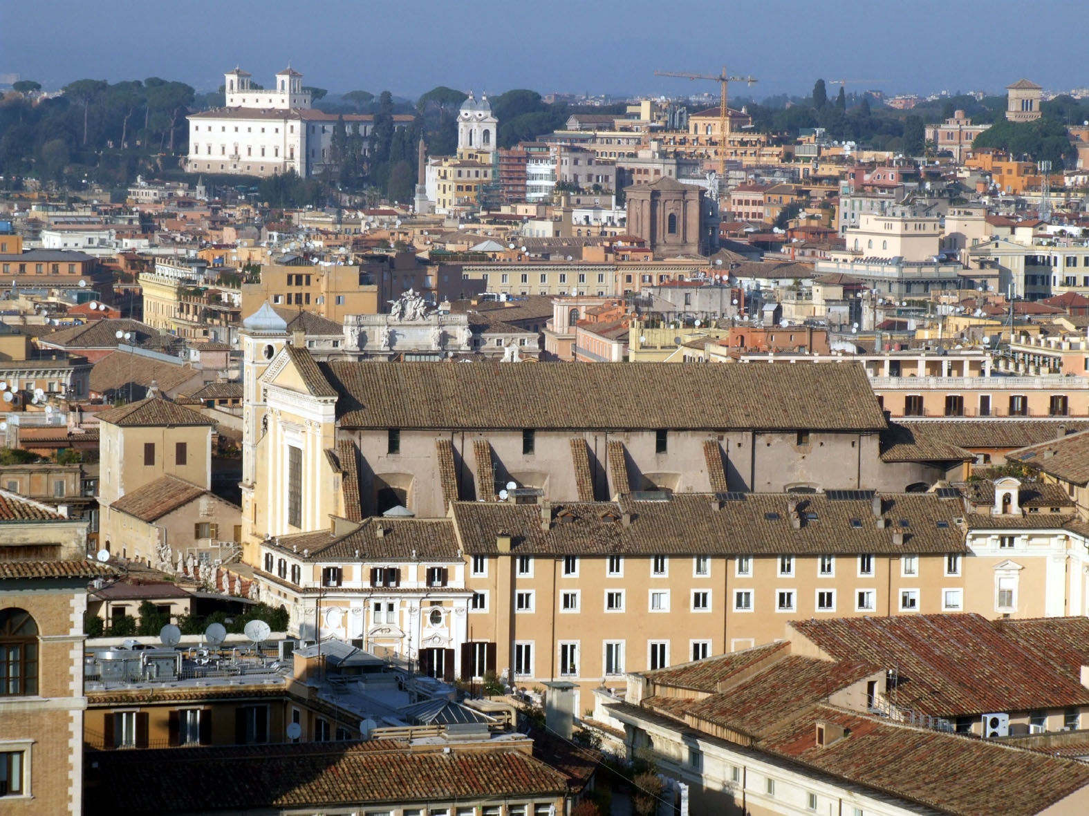 Santi Apostoli, Roma, dal Vittoriano